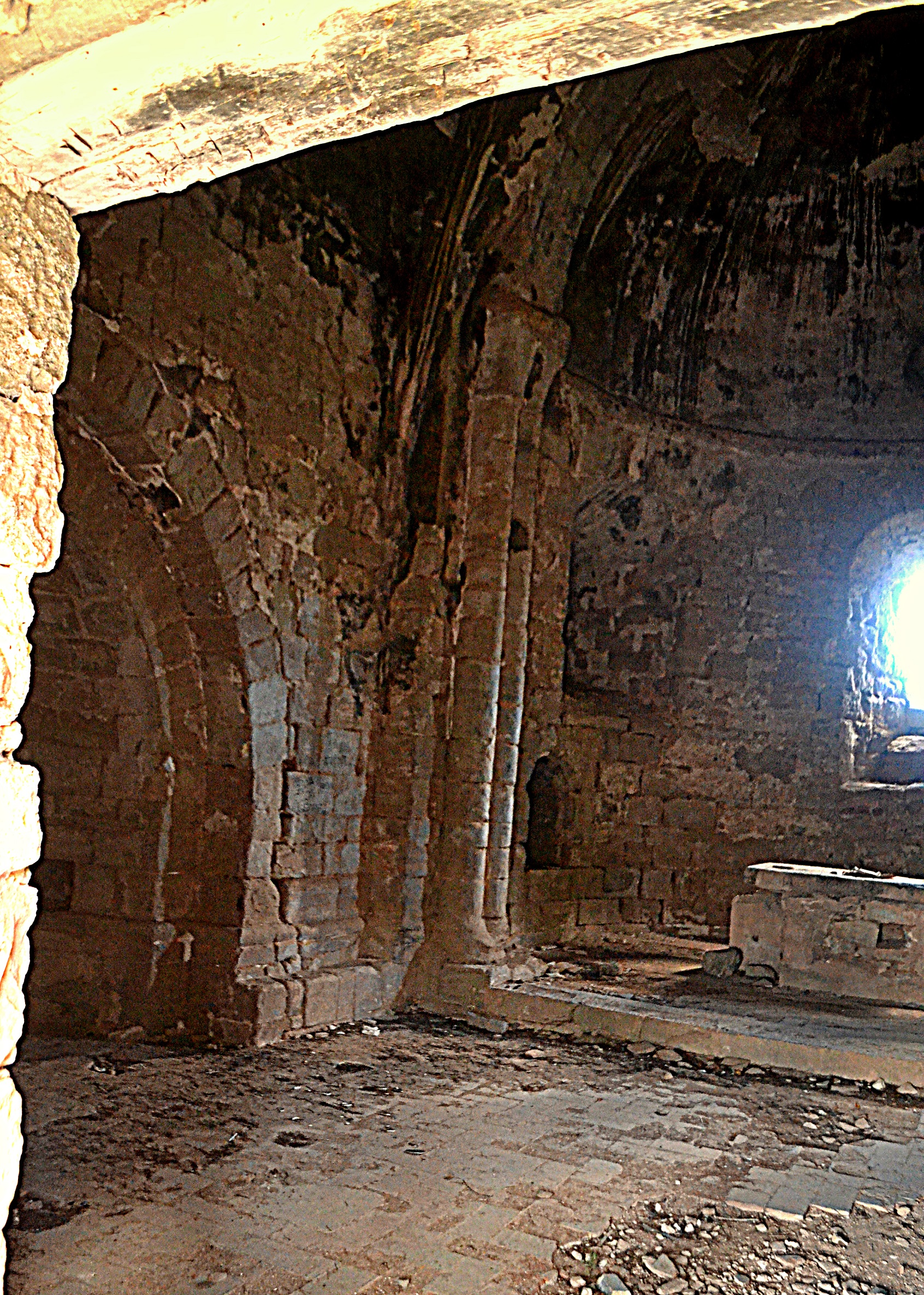 Església de Santa Maria de la Roqueta (Sant Martí de Tous)